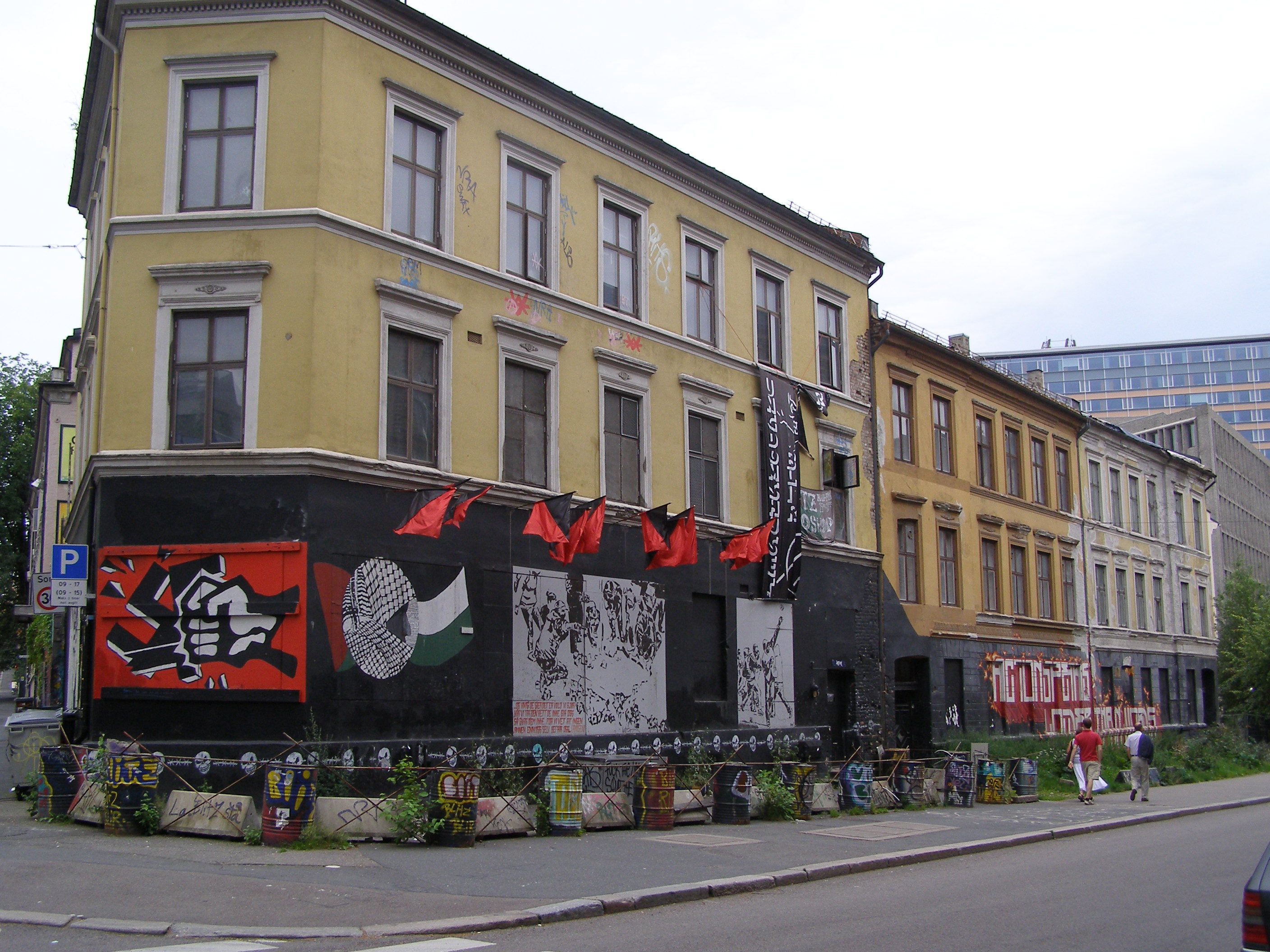 Blitzhuset i Oslo 2007.